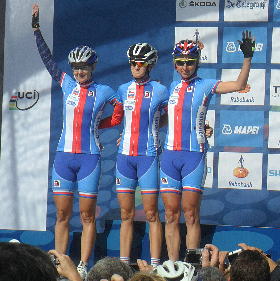 Ploegenpresentatie Tsjechië voor de start van het Wereldkampioenschap 2012 in Valkenburg, Nederland.